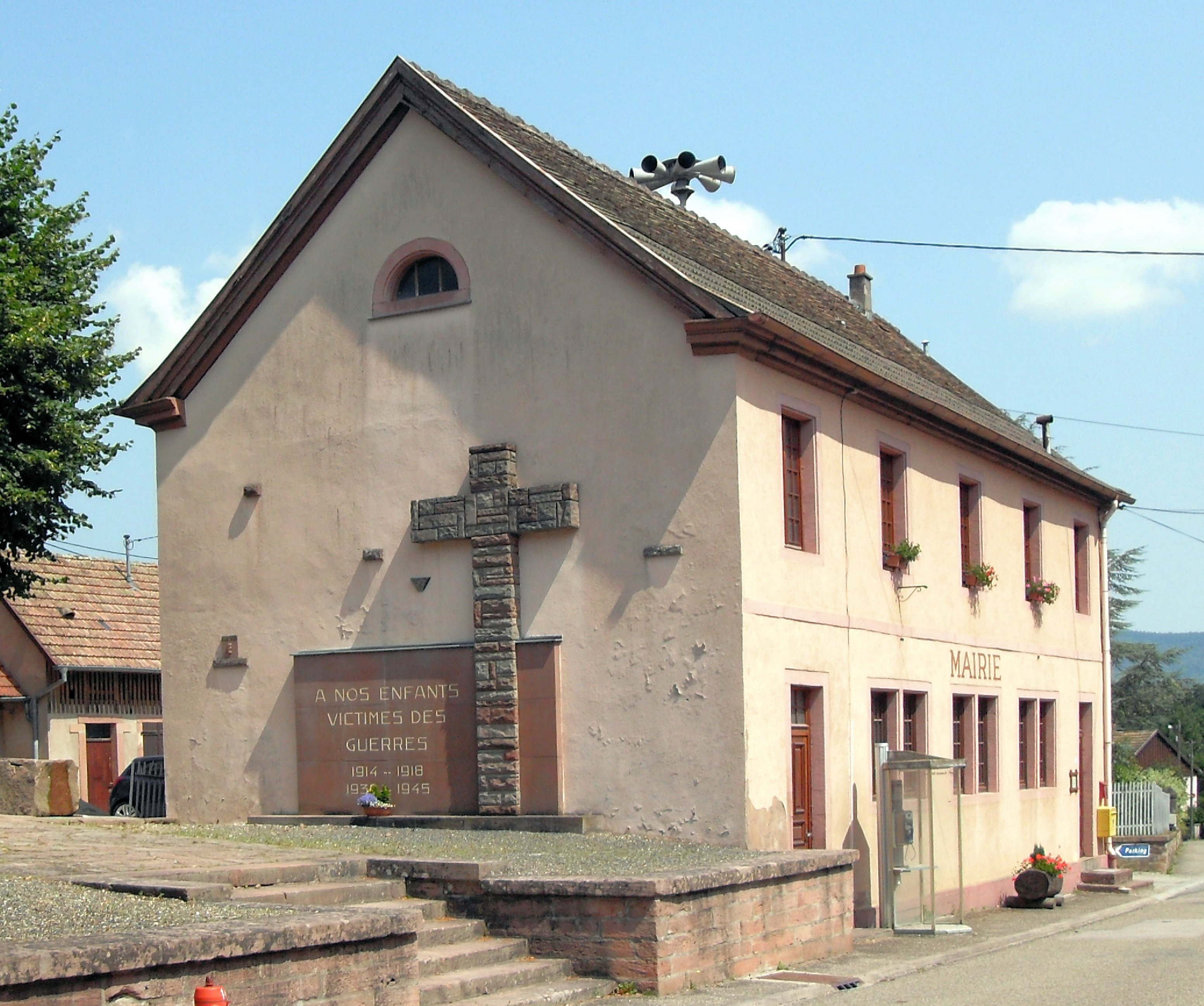 La mairie de Breitenau